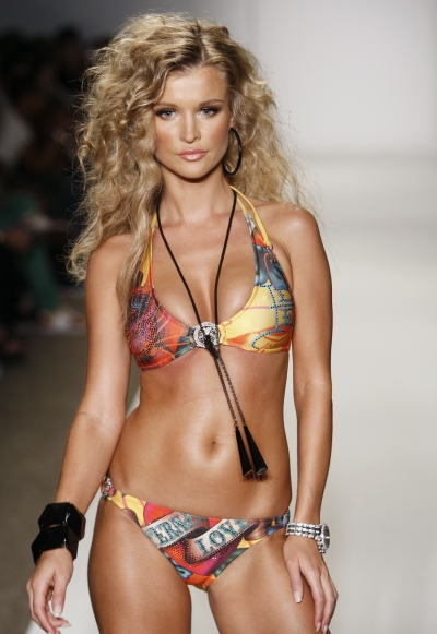 Joanna Krupa